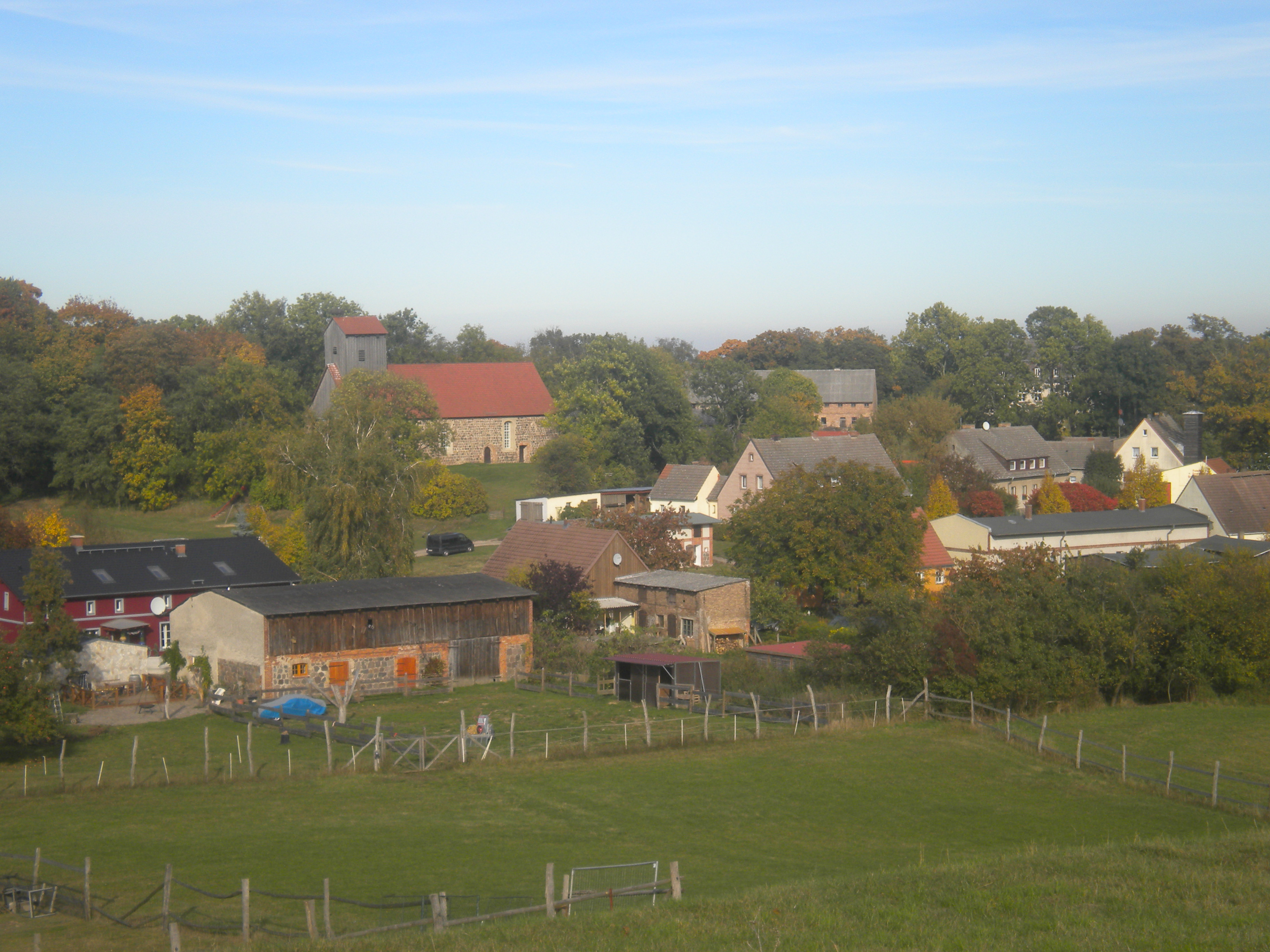 Blick auf das Dorfzentrum